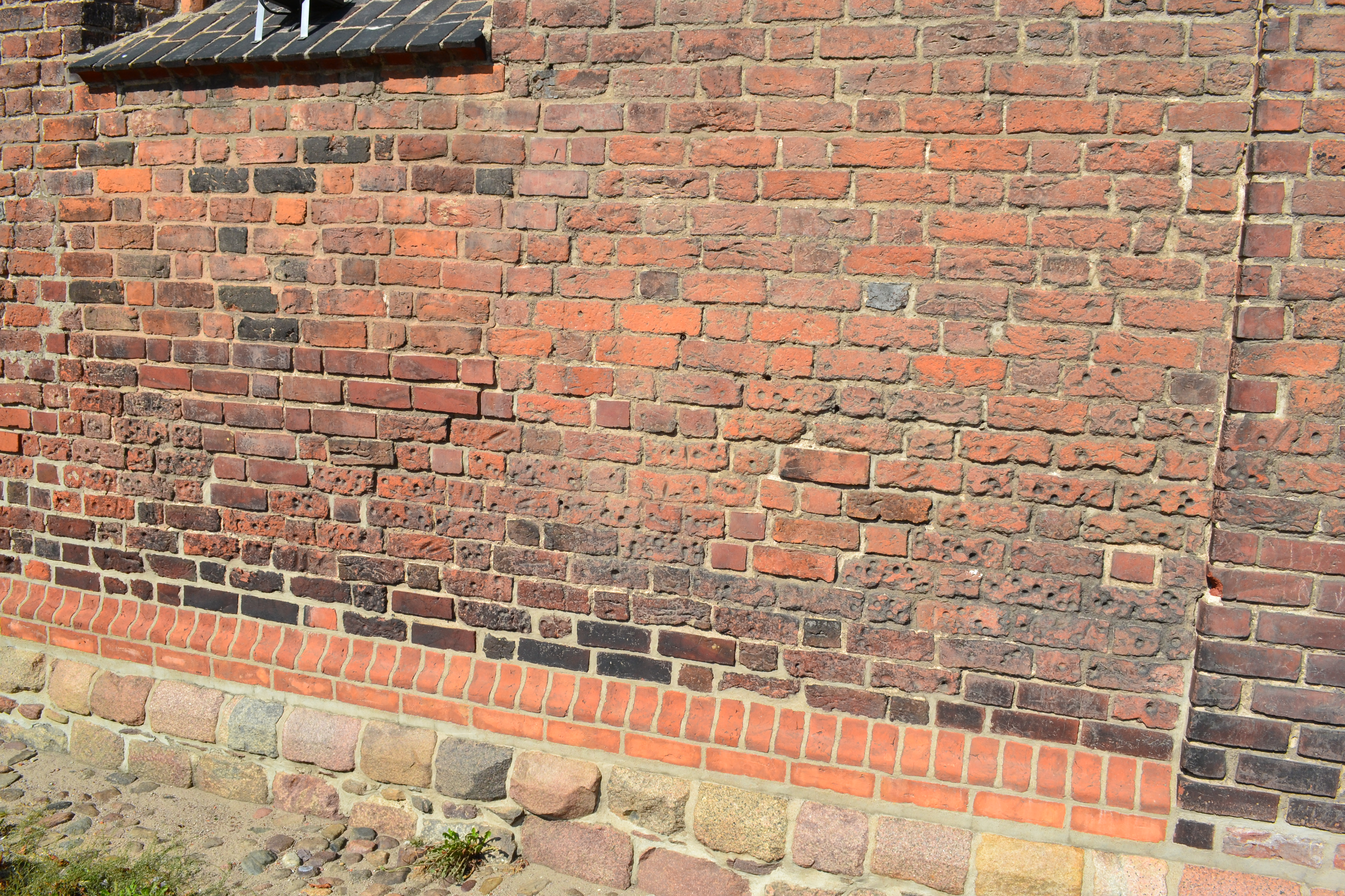 Katedra Wniebowzięcia NMP w Gorzowie Wielkopolskim